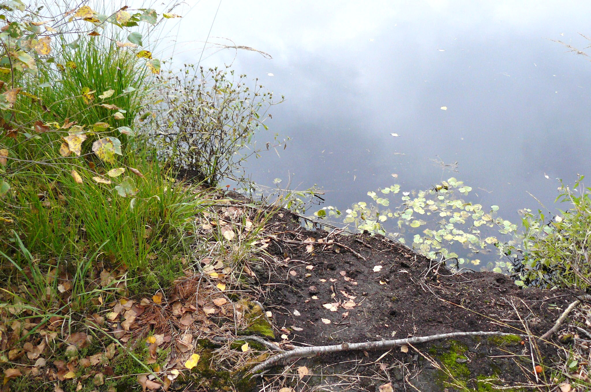 Torf na terenie Bagna Chlebowo.